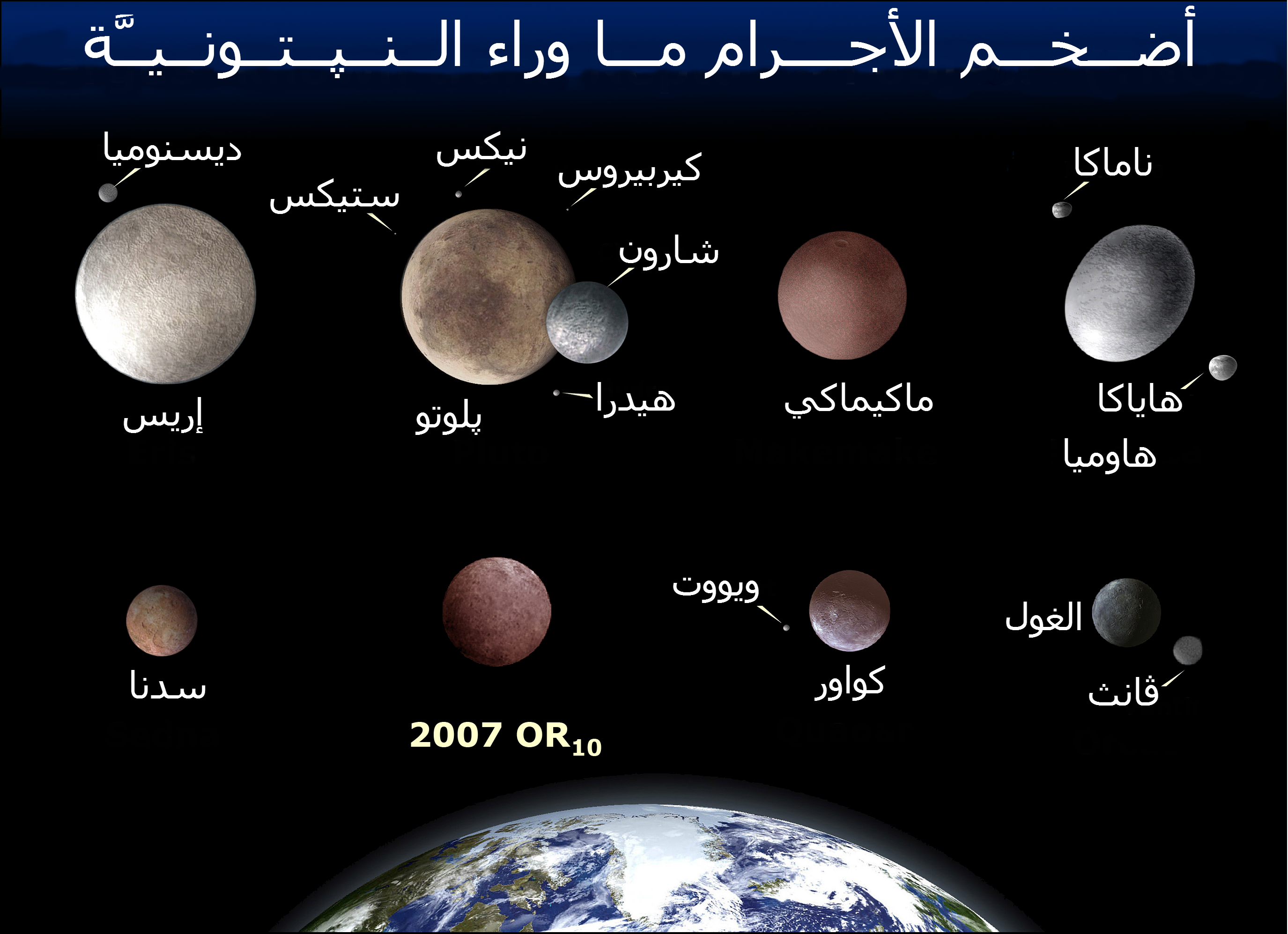 مُقارنة بين أكثر ثمانية أجرام وراء النپتونيَّة بريقًا: إريس، پلوتو، ماكيماكي، هاوميا، سدنا، 2007 OR10، كواور، والغول. خمسةٌ من هذه الأجرام يُعرفُ عن دوران أقمار في أفلاكها2007 OR10 و كواور يُقدَّرُ بأنَّهُما أكبر حجمًا من سدنا. يُعتقدُ بأنَّ 2002 MS4 أكبر حجمًا من الغول يليهما ساليسيا، لكنَّهما أقل بريقًا. نظرًا لِأنَّ كواور والغول يتمتعان بِأقمار، يُعرفُ على وجه الدقَّة أنَّ كواور أكبر حجمًا من نظيره. يتفق الاتحاد الفلكي الدولي على اعتبار الأجرام الأربعة العُليا كواكب قزمة بينما تُعتبرُ الأربعة السُفلى كواكب قزمة مُحتملة على أنَّ فريقًا من الفلكيين يعتبرها كواكبًا قزمة فعليَّة.